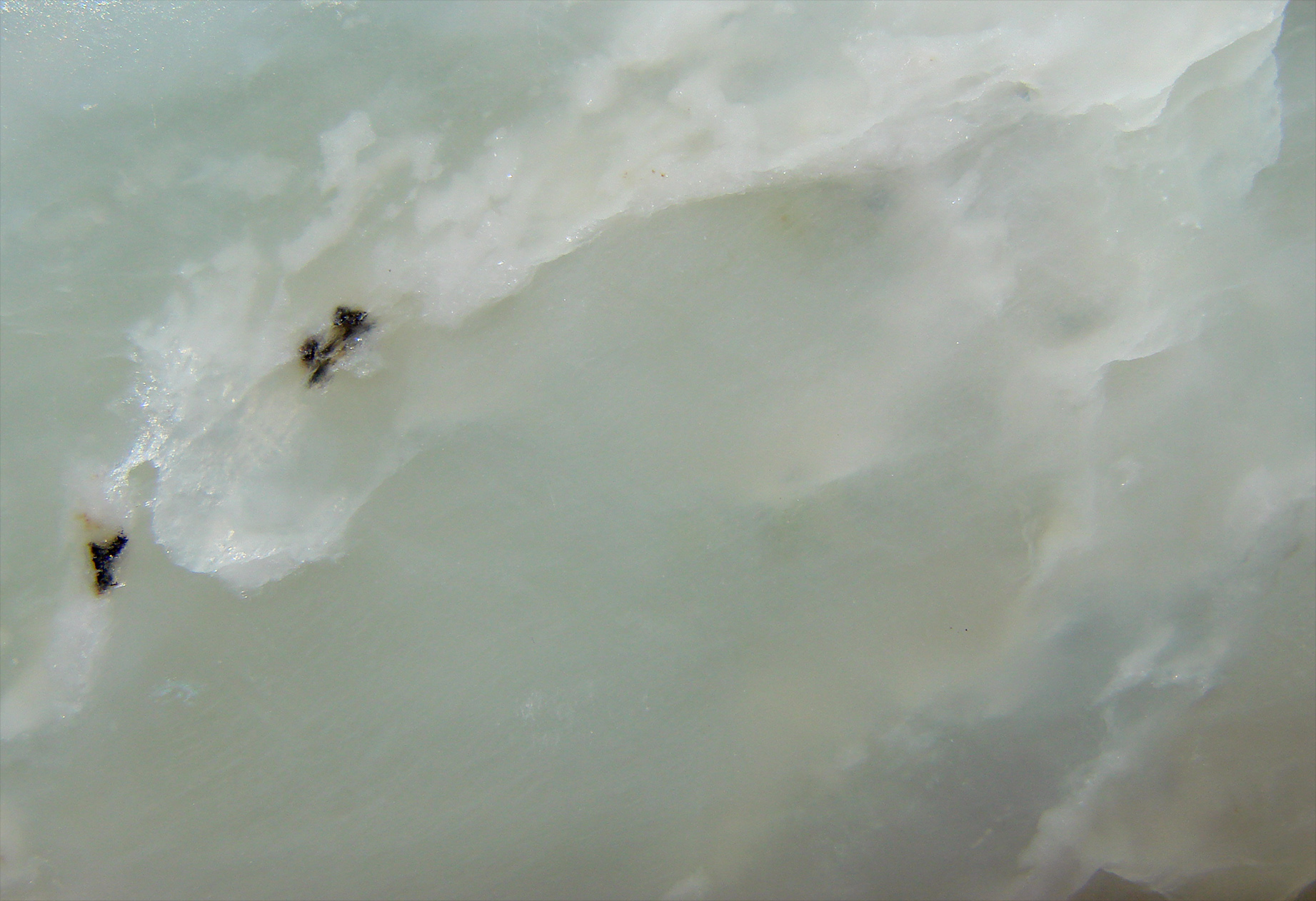 Jadéite polie, gros plan.